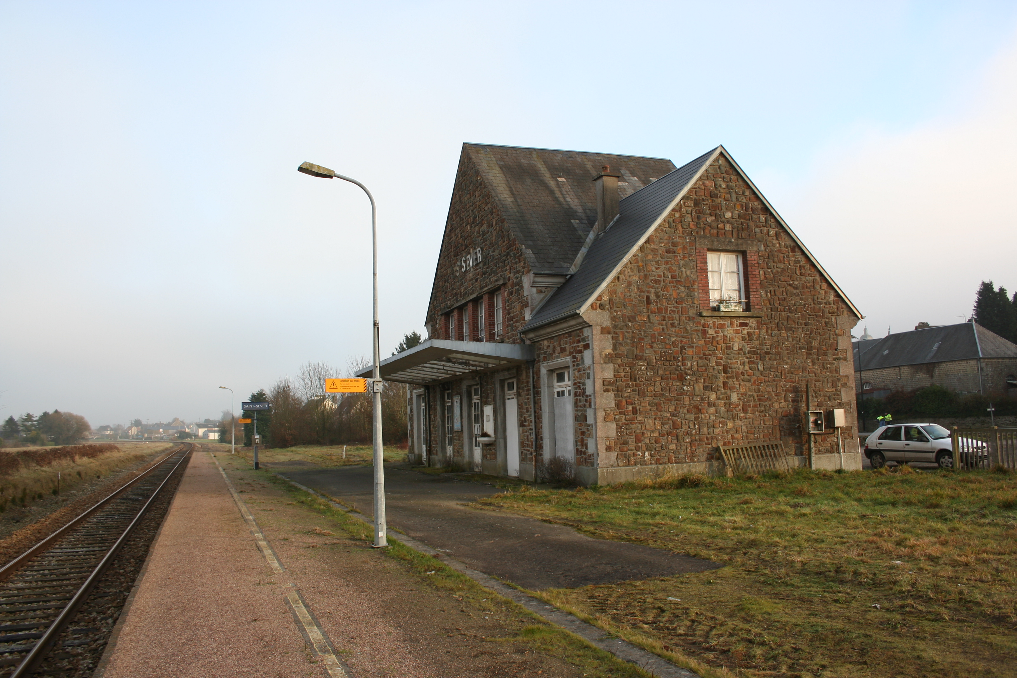 gare ferroviaire de saint-sever - Calvados - France